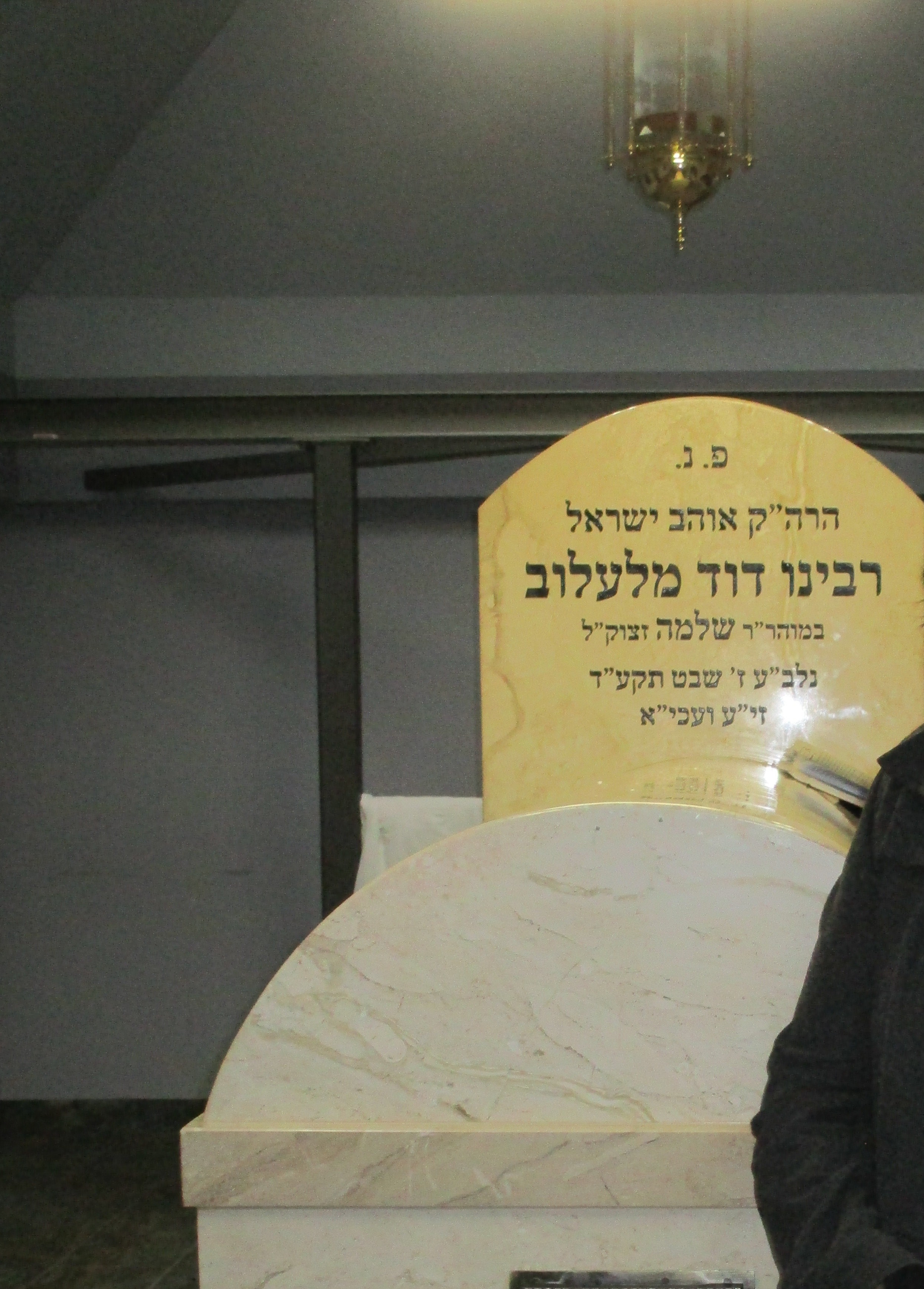 מצבת קברו של רבי דוד מלעלוב (1).jpg